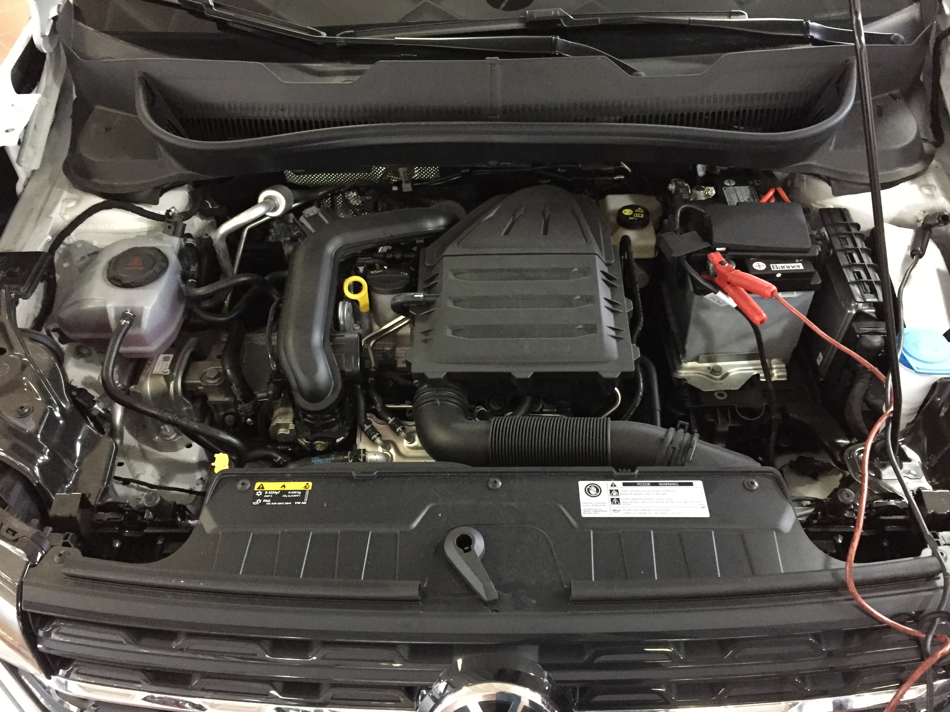 VW T-Cross Motorraum